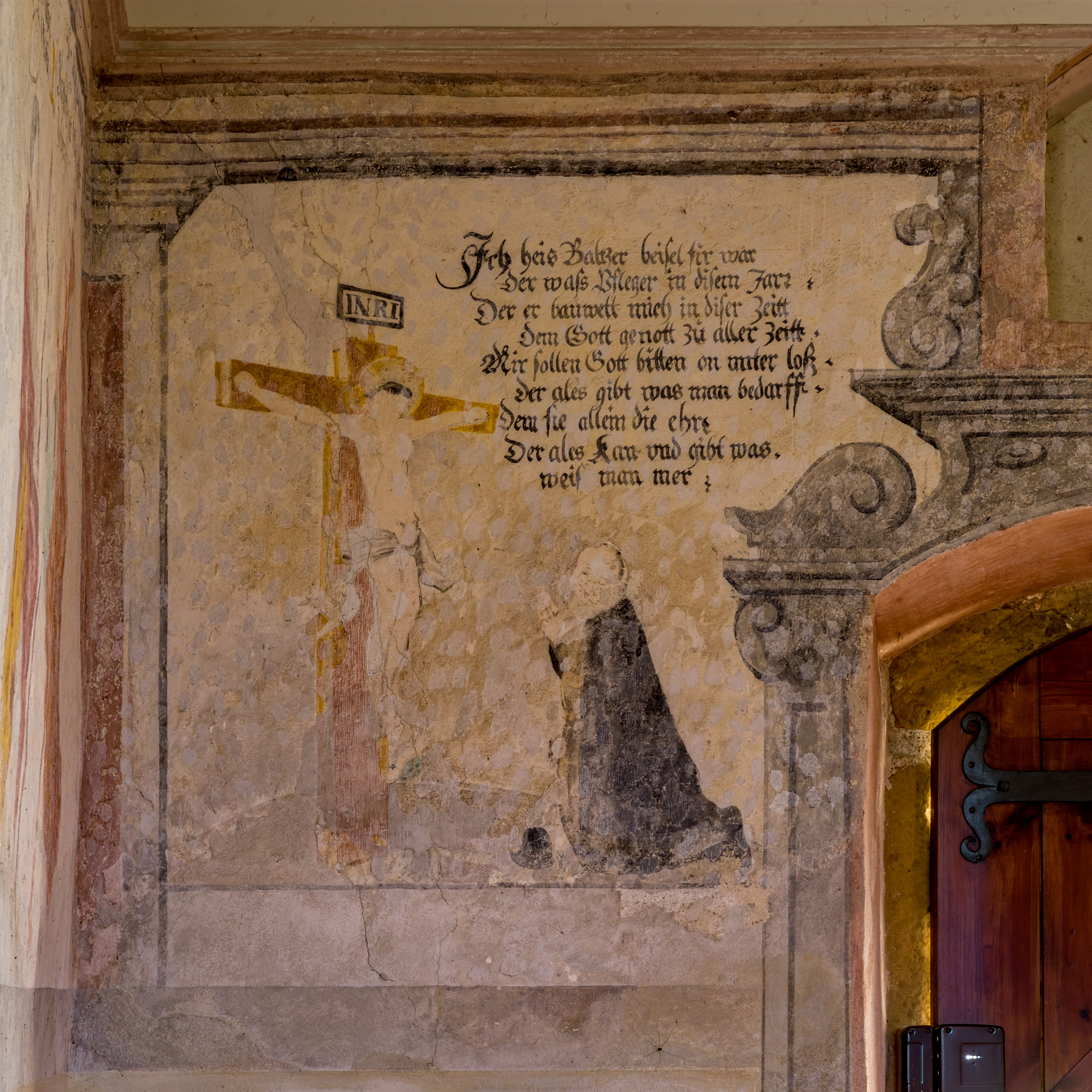 Bilder aus Staufen im Breisgau, die St. Magdalenenkapelle